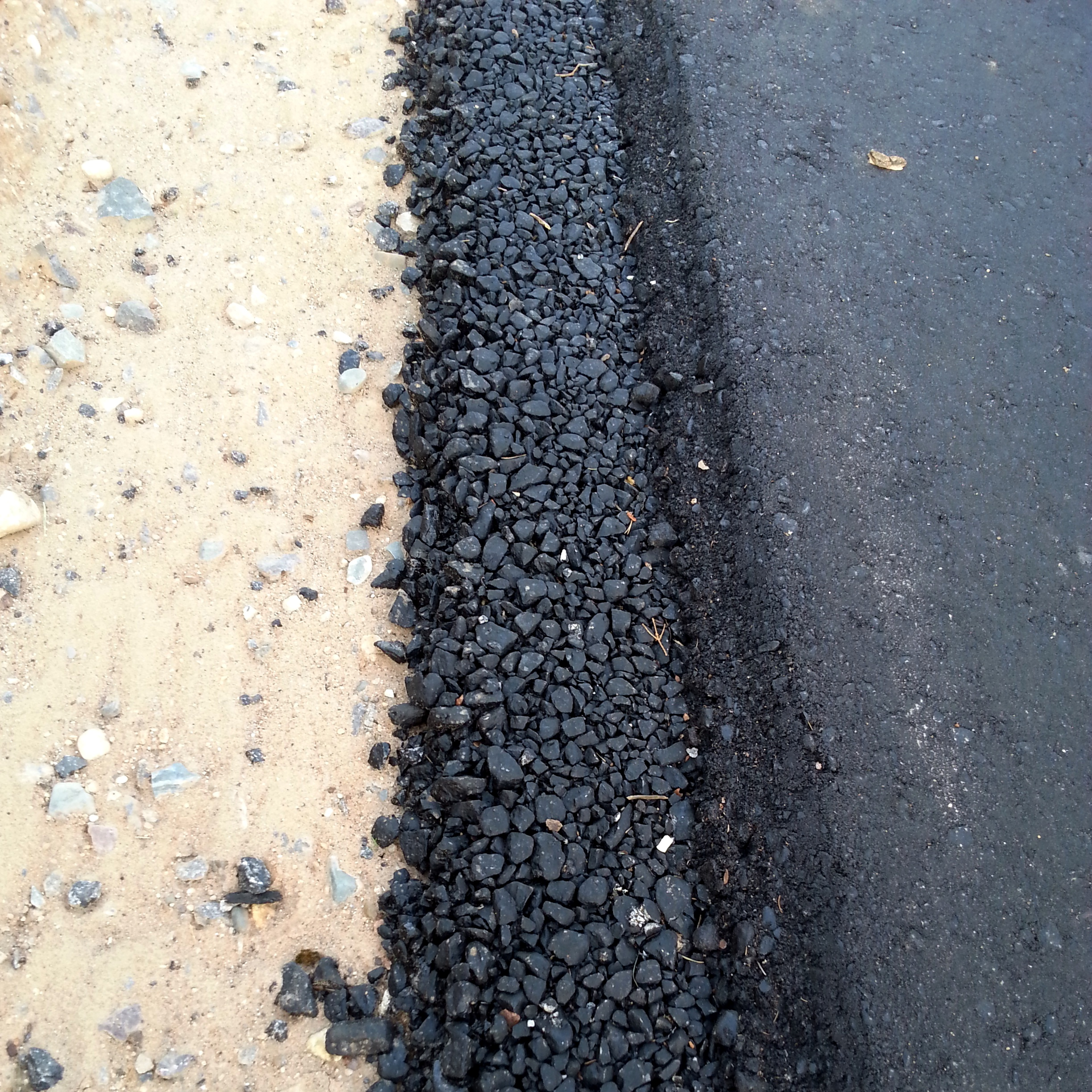 Автомобильная дорога Котлас-Сыктывкар около д.Нырма